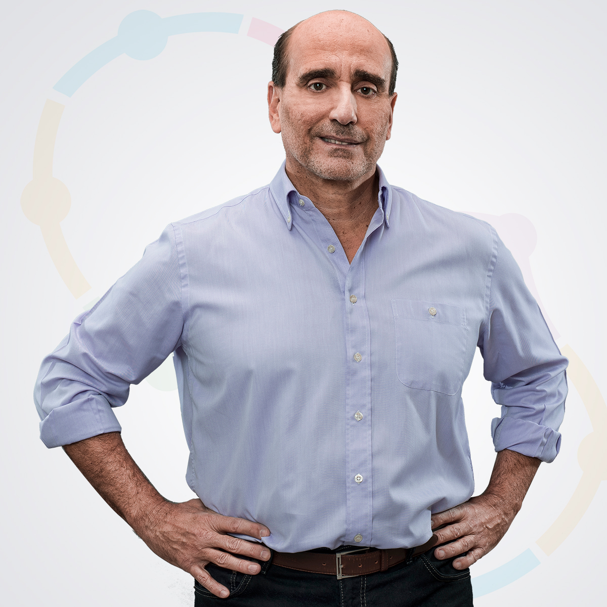 Carlos Mateo Balmelli en el 2017